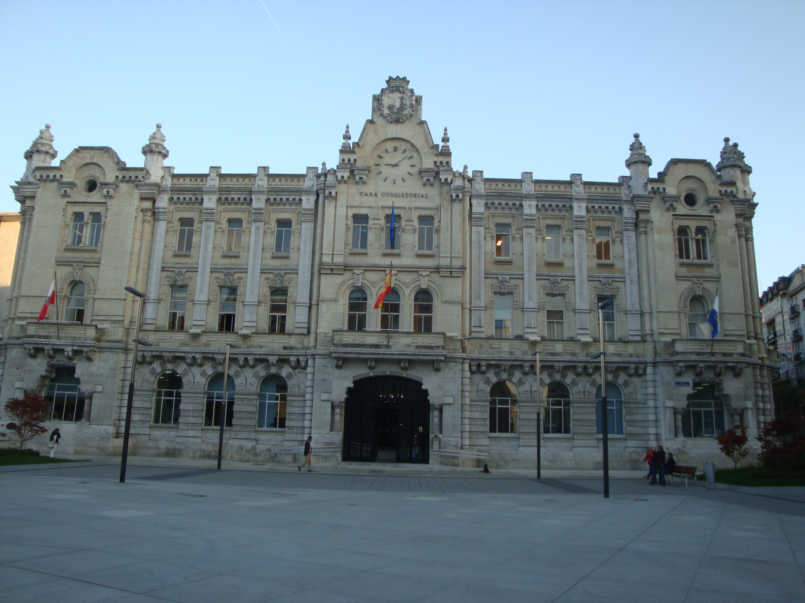 Ayuntamiento de Santander.